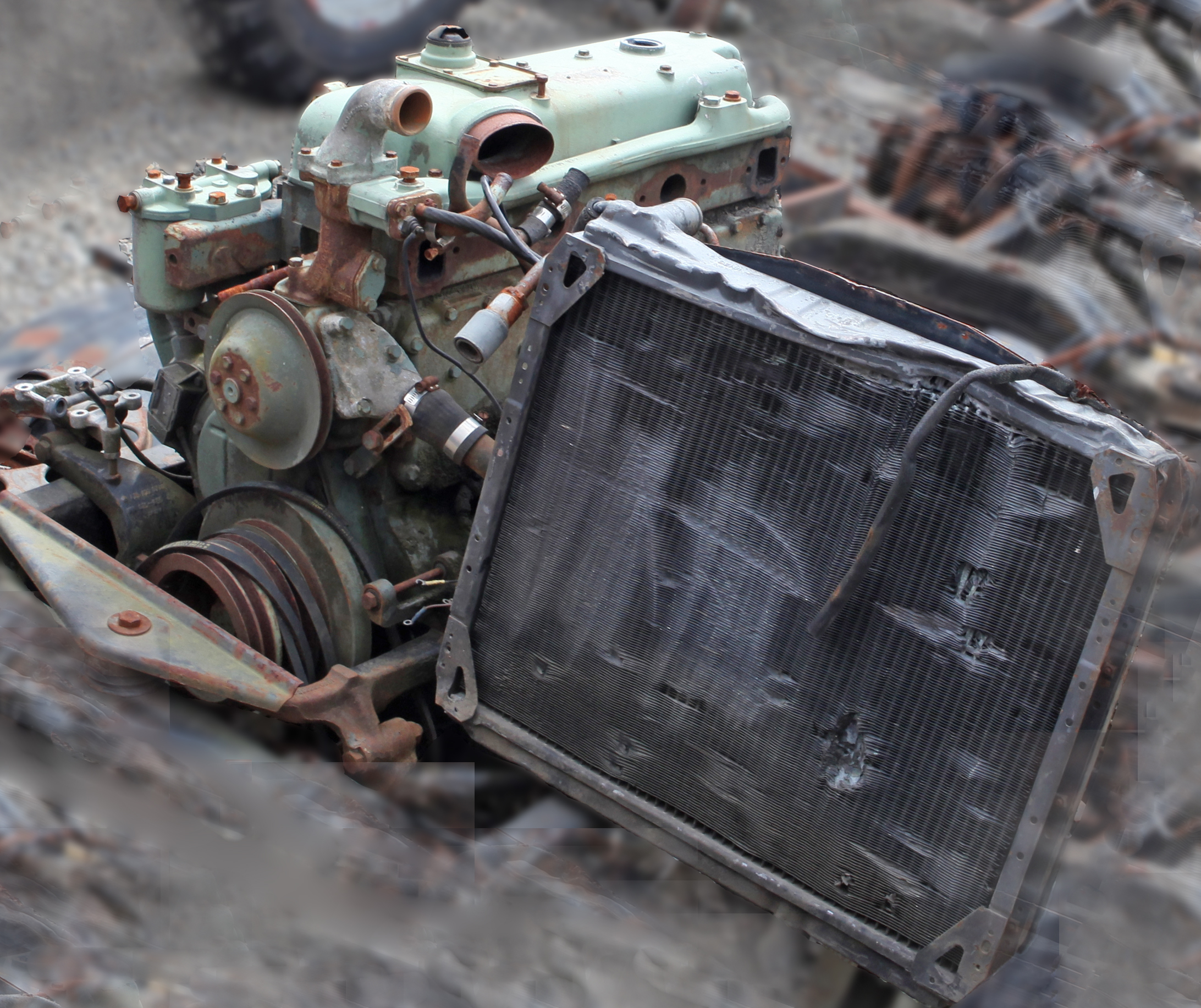 Reste eines OM 352 in einer Unimogleiche